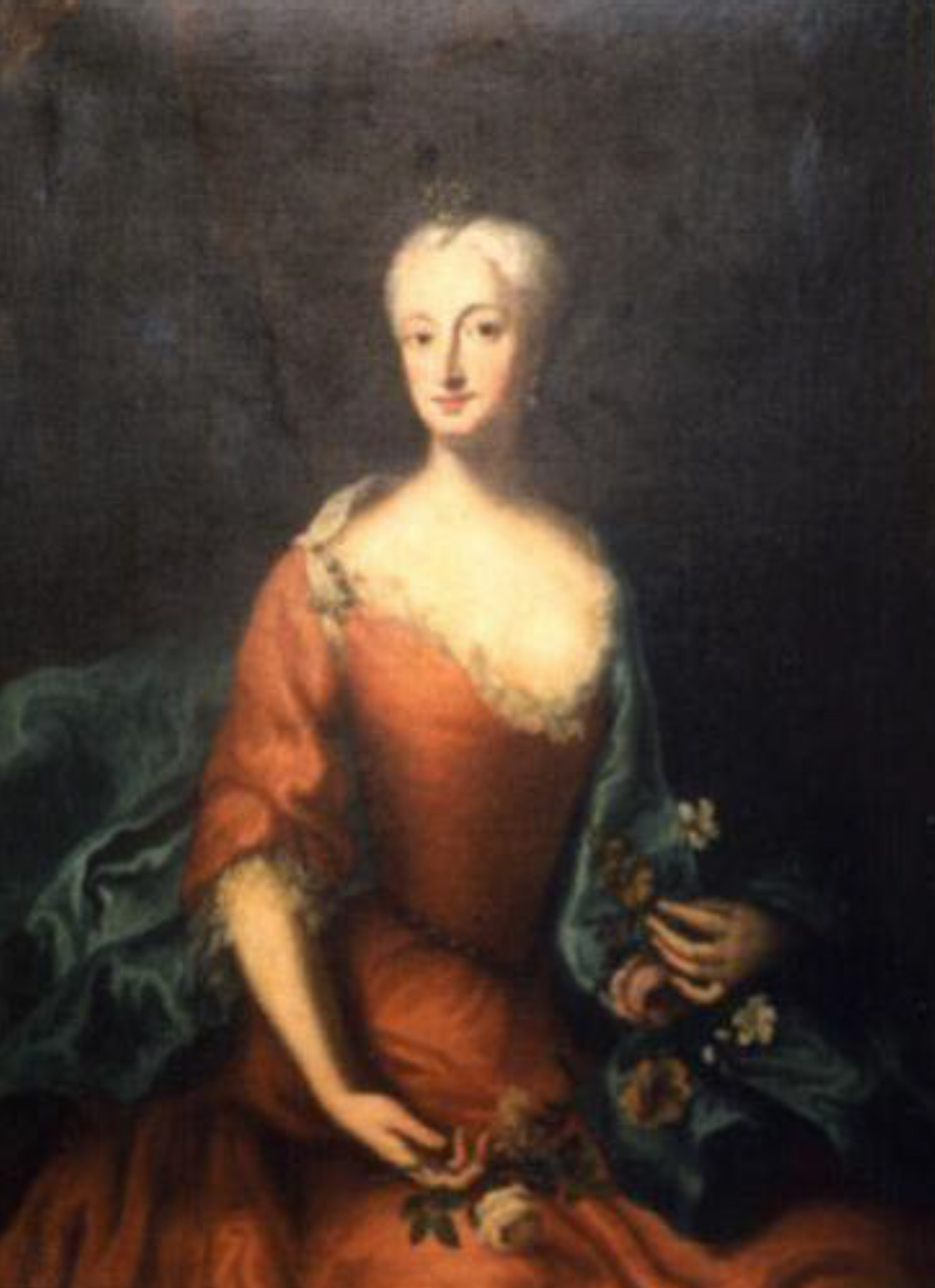 Sophie Caroline von Camas (1686-1766), Vertraute Friedrichs des Großen